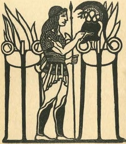 I poeti greci tradotti da Ettore Romagnoli. OMERO - Omero minore, con incisioni di A. De Carolis, Nicola Zanichelli Editore, Bologna 1925